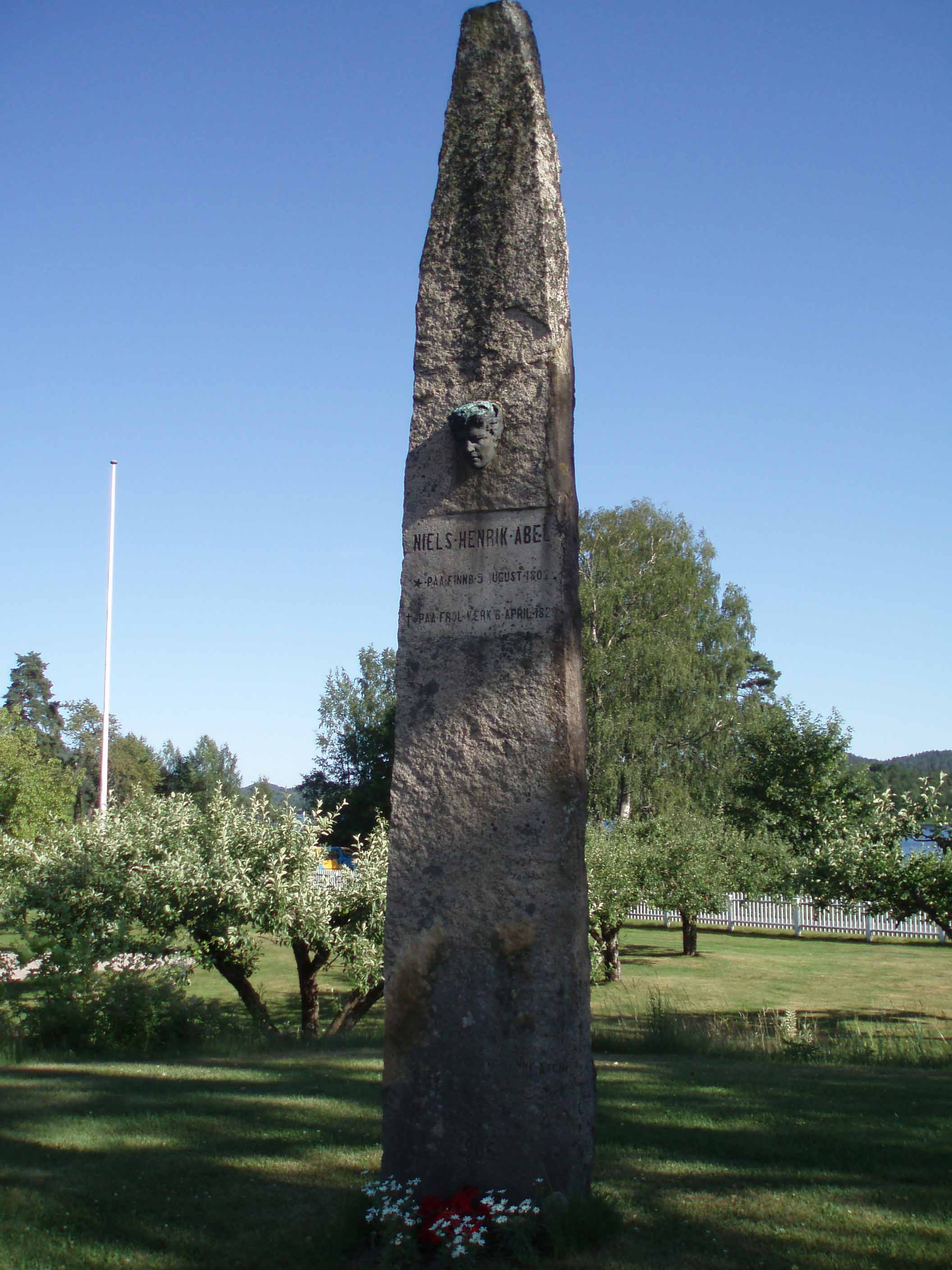 Monument of Nils Henrik Abel, Frolands værk, Norway